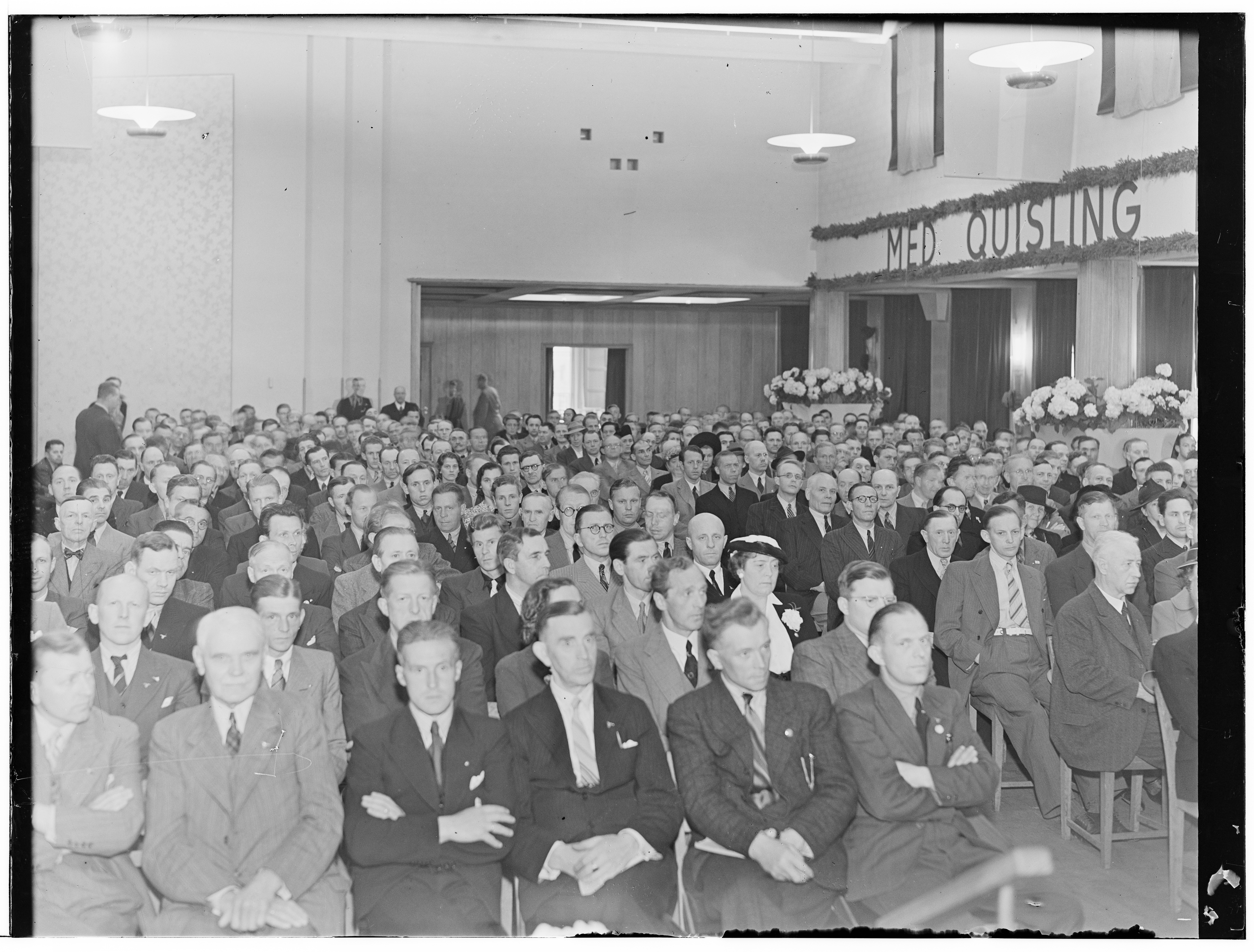 Nasjonal Samling. Fagorganisasjonens møte i Stortingsgt. 20. Foto trolig fra «N.S. faggruppeorganisasjons tillitsmannskursus» mandag 9. juni 1941 som omtalt i Aftenposten dagen etter. Ifølge NTBs reportasje foregikk møtet i festsalen i Stortingsgaten 20 kl. 20 («Det store lokale var fylt til trengsel av tillitsmenn fra hele landet.») Landsleder i N.S. F. O. Odd Fossum ønsket velkommen. Kveldens foredragsholder var «kst. statsråd dr. Gulbrand Lunde» som blant annet talte om «arbeidernes stilling i den nye stat“, «arbeidsløshetsproblemet» og «faggruppenes oppgaver».